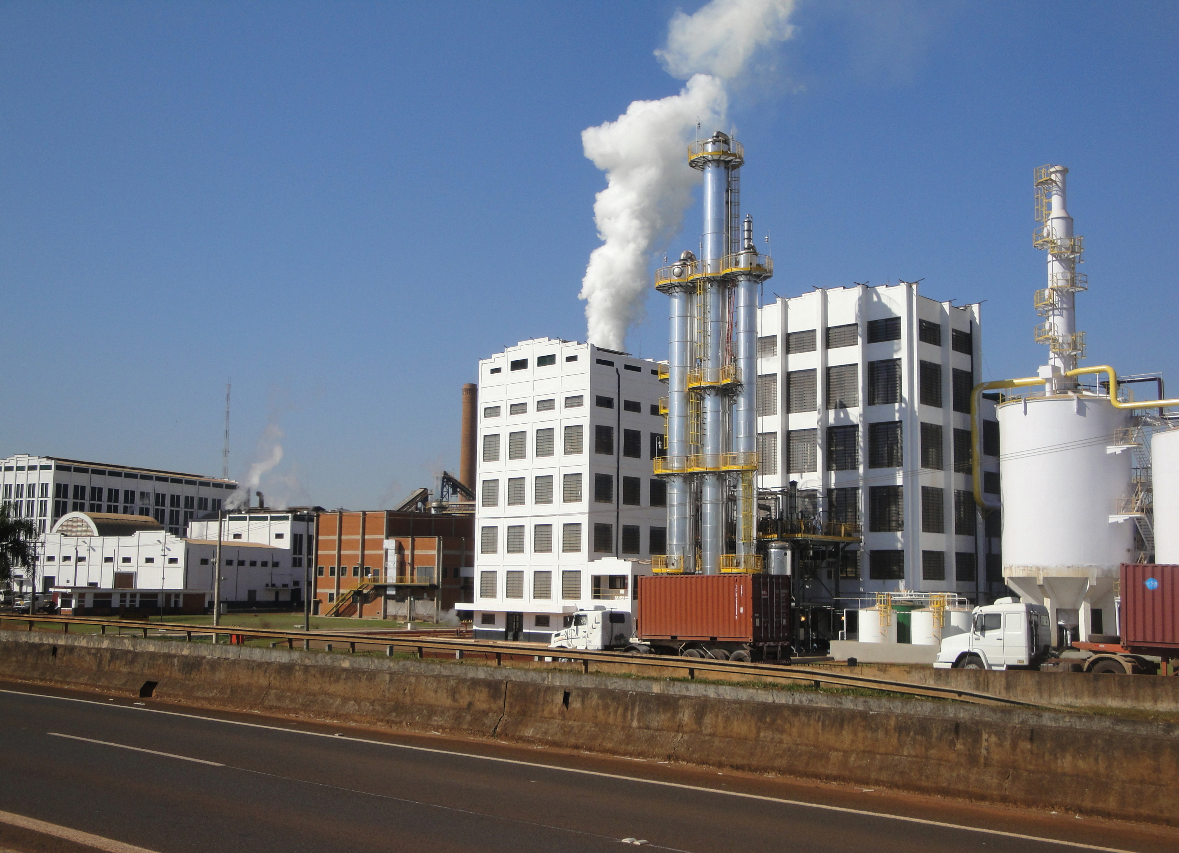 Usina São Francisco(UFRA), vista da SP-333 - Rodovia Atílio Balbo Km-96. Usina adquirida pela Organização Balbo em 1956